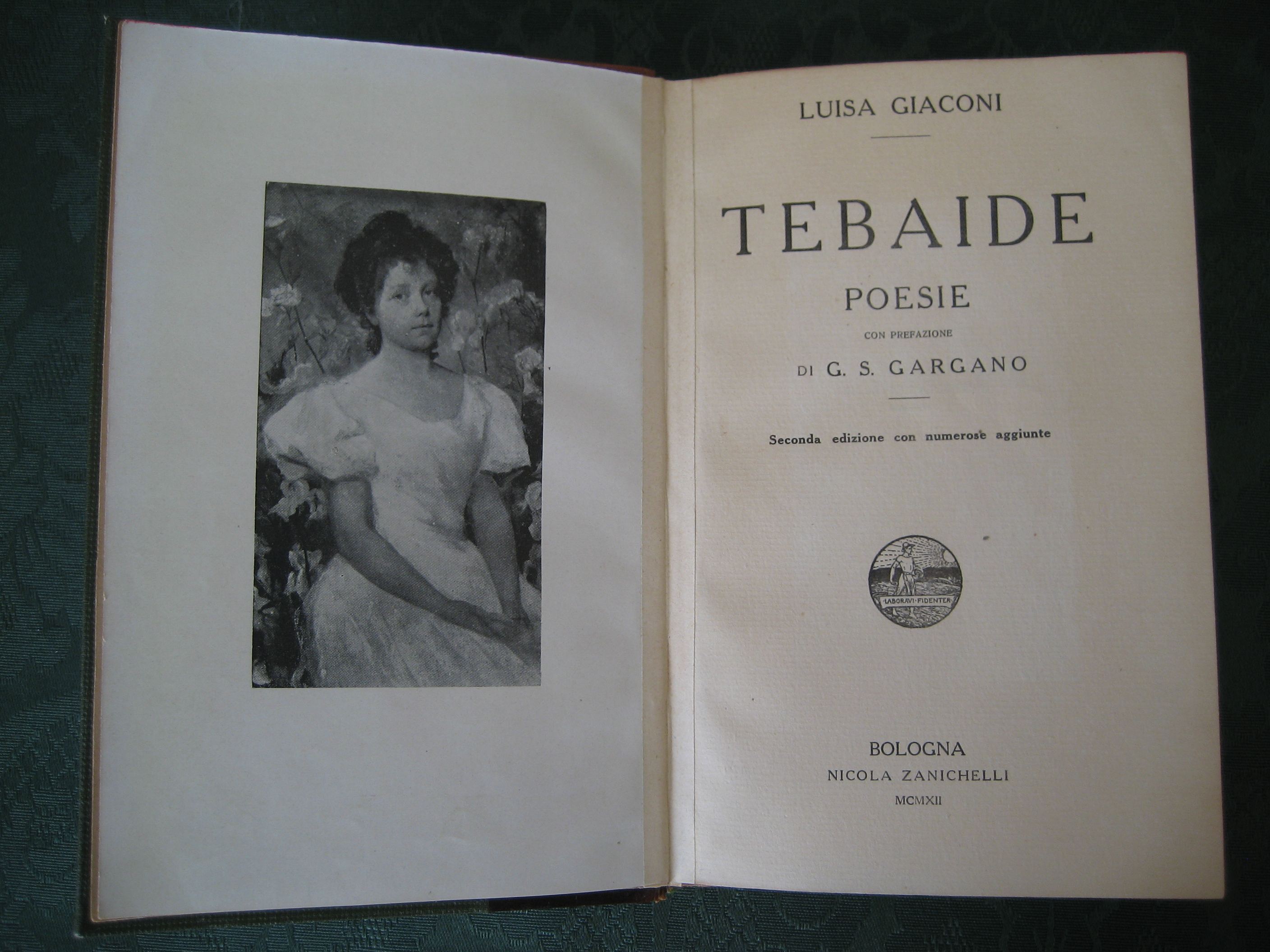 Fotografia del frontespizio dell'edizione del 1912 della raccolta di poesie Tebaide, di Luisa Giaconi. Sulla pagina a fianco, ritratto della poetessa eseguito da Romea Ravazzi.